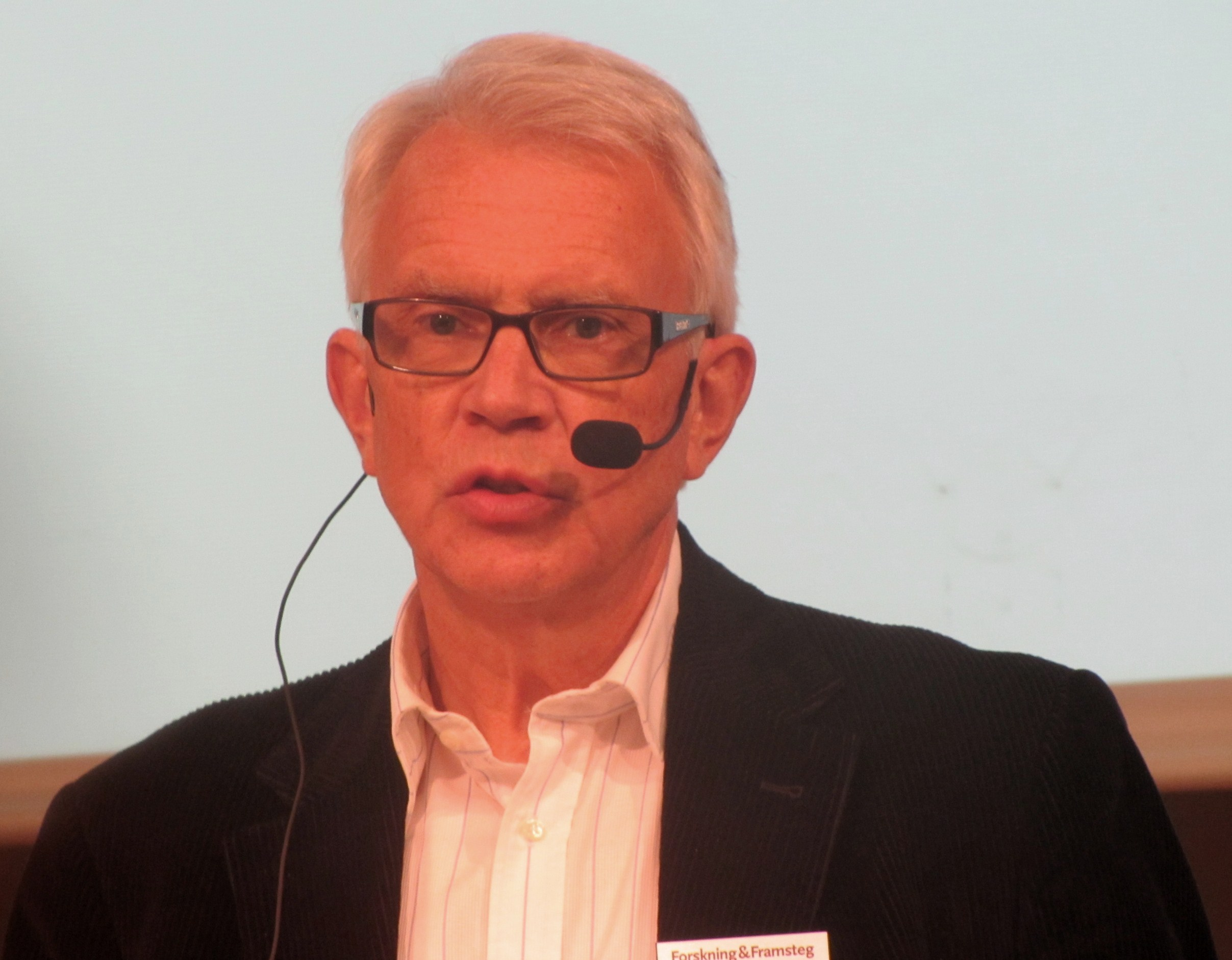 Björn Fjæstad, f.d. chefredaktör för tidskriften Forskning & Framsteg.